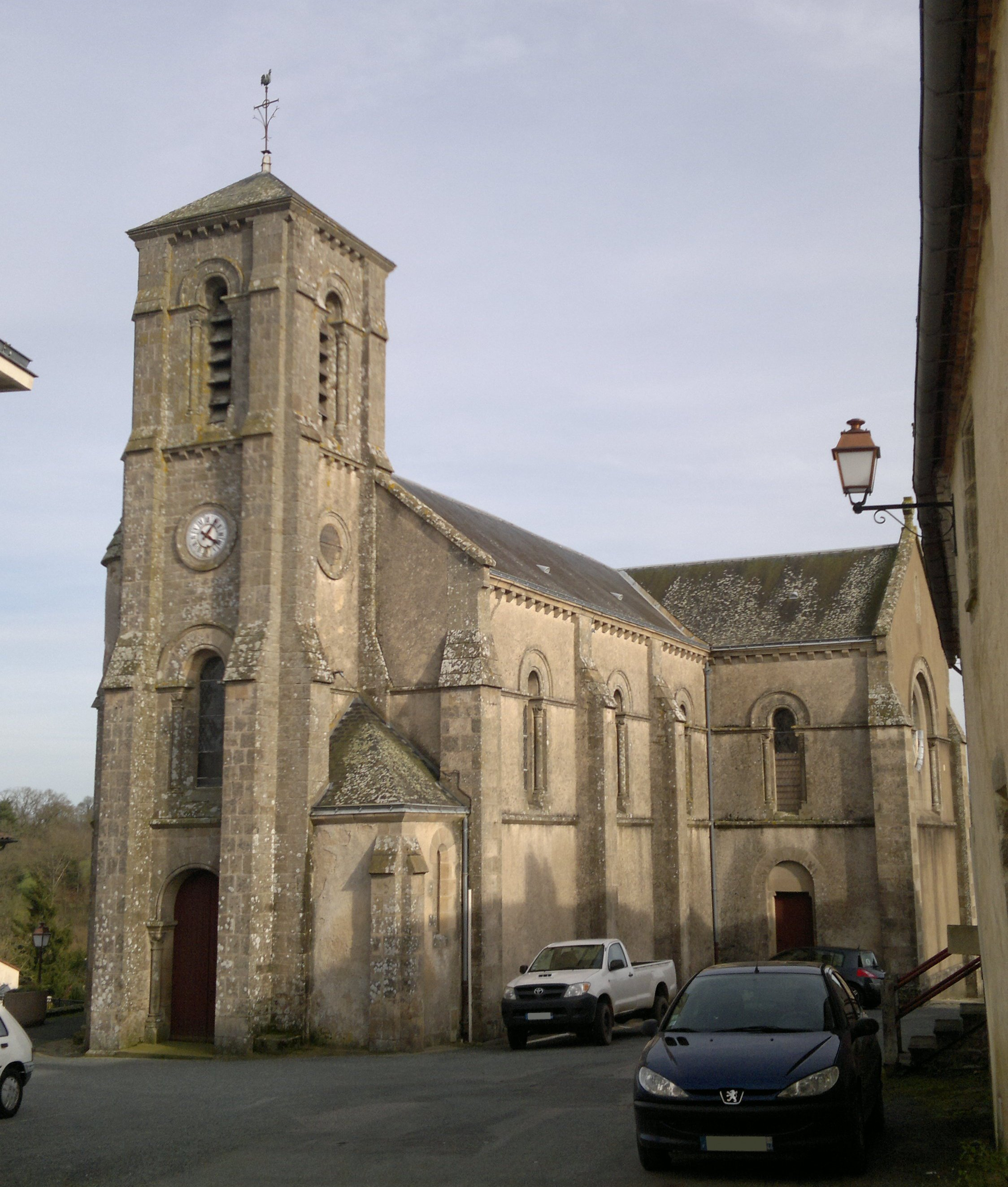 Église d'Évrunes, Fr-85-Mortagne-sur-Sèvre.